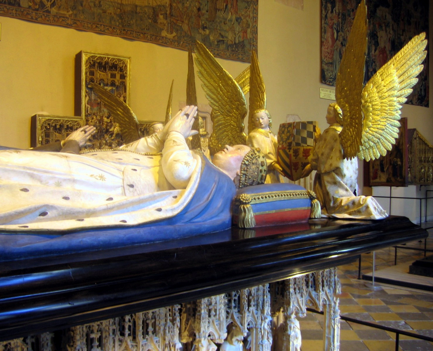 Dijon : musée des Beaux-Arts : tombeau de Jean Sans Peur et Marguerite de Bavière (salle des gardes)